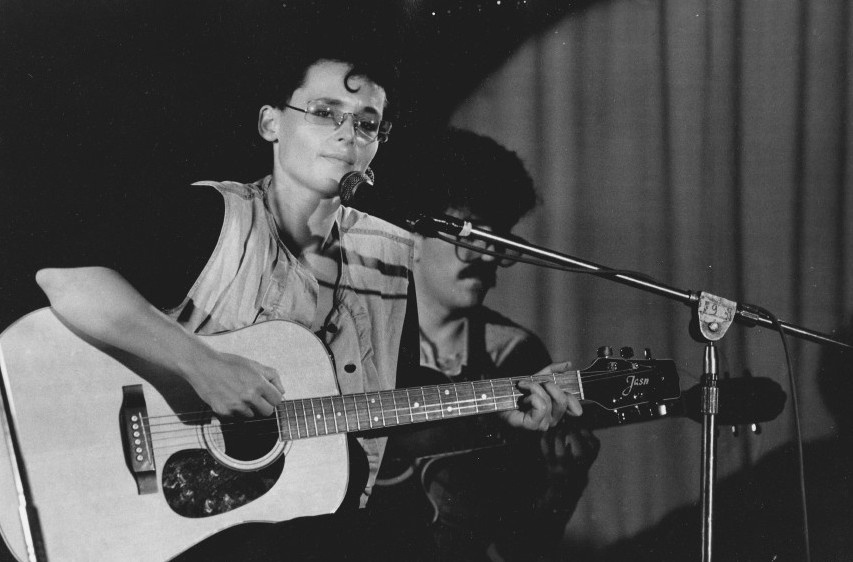 Leipziger Liederszene: Maike Nowak; Foto: Szenefotograf Jochen Janus